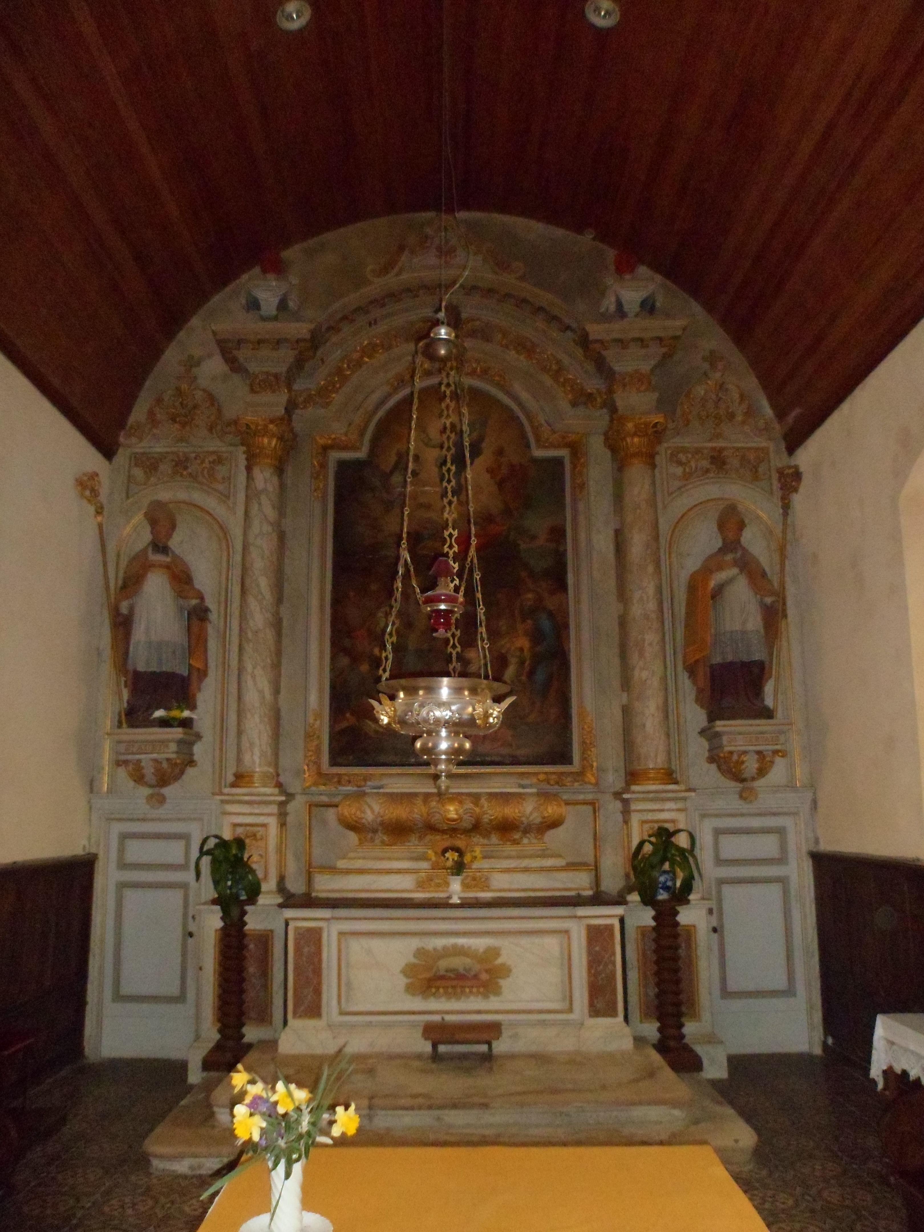 église Saint-Aubin de Saint-Aubin-du-Perron